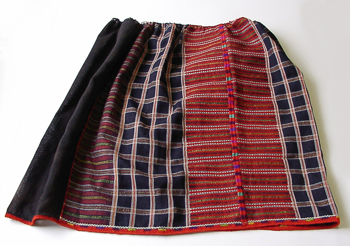 Понева. Шебекинский район, нач. ХХ века. Из фондов Шебекинского историко-художественного музея.